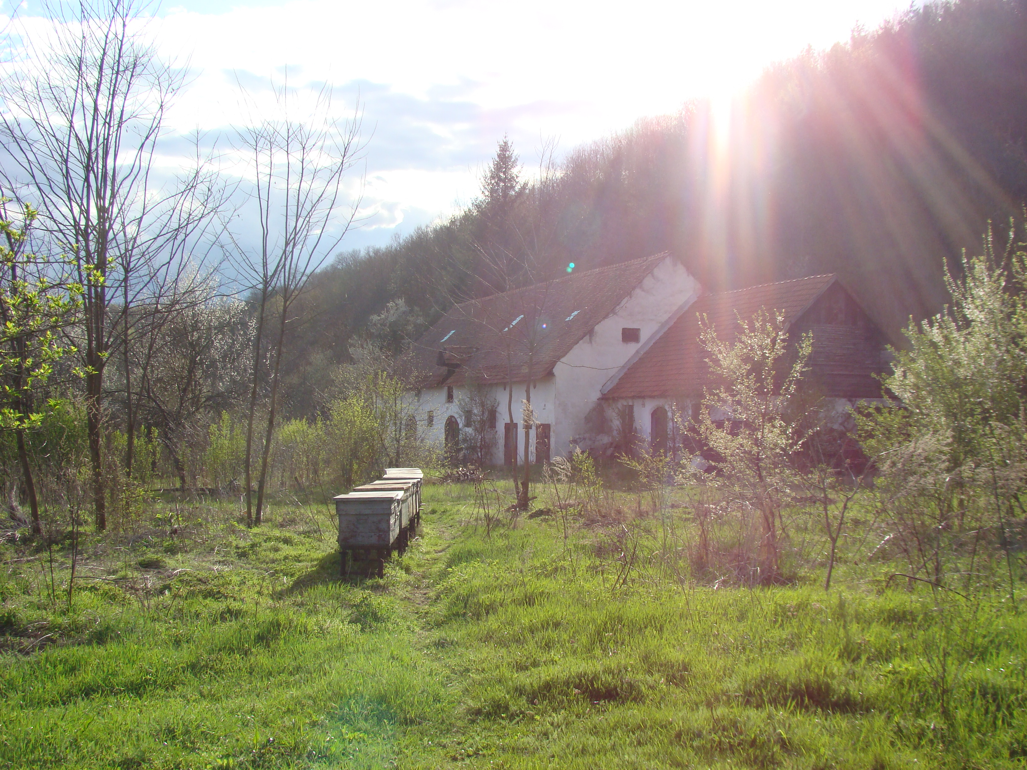 Ansamblul castelului Konopi 02